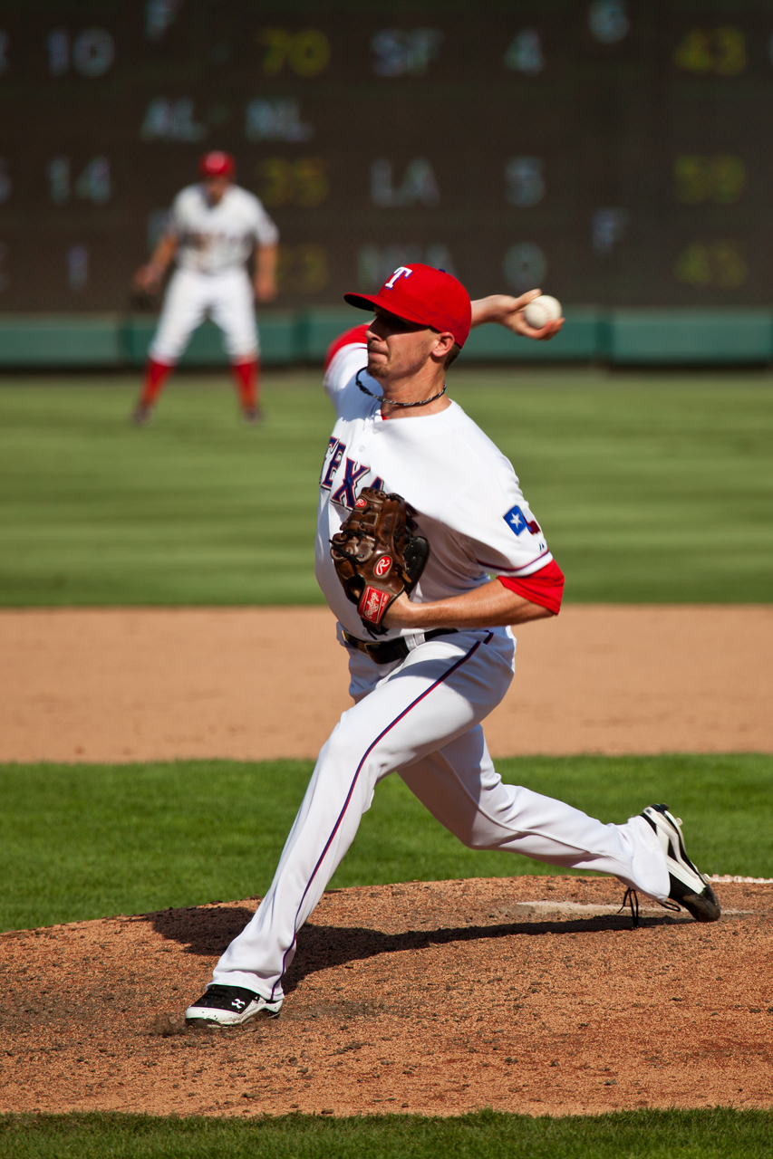 Tanner Scheppers pitching in 2012.